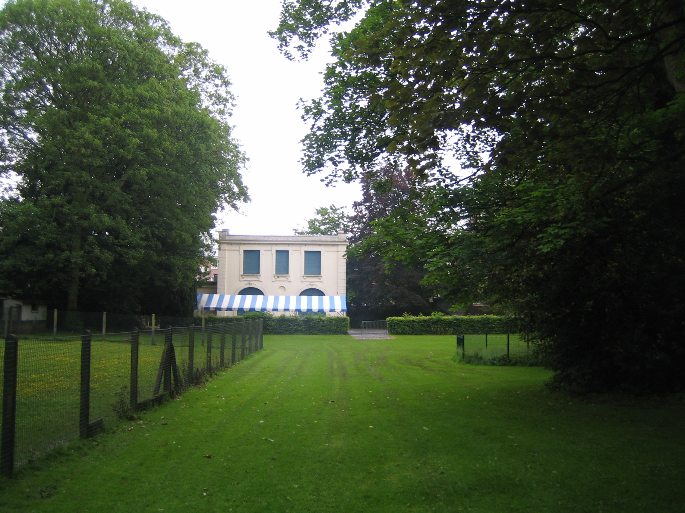 Jardin du château Claeys, à Ascq.